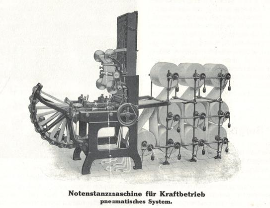 Notensatzmaschine für pneumatische Spielautomaten